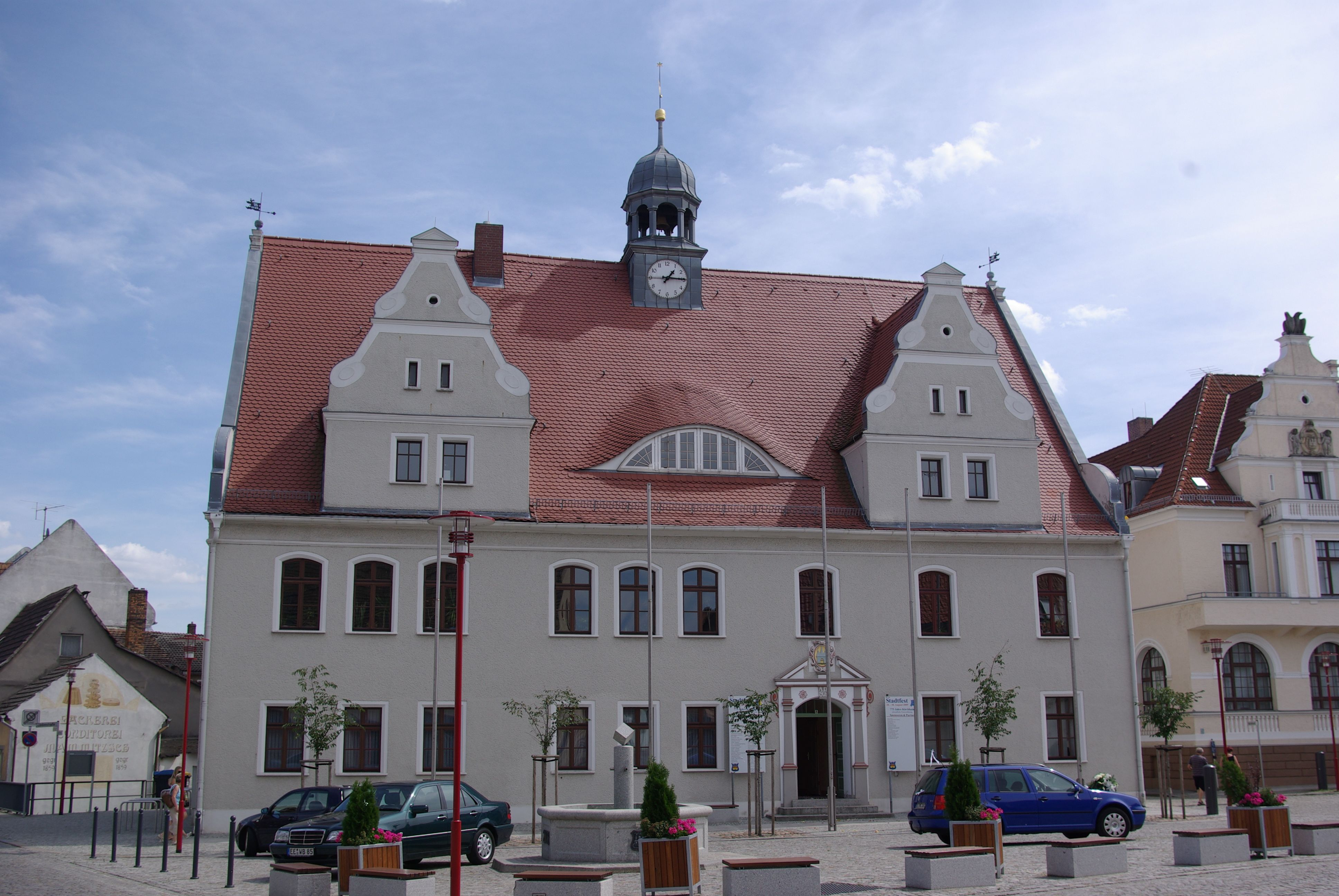 Doberlug-Kirchhain in Brandenburg. Das Rathaus im Ortsteil Kirchhein am Markt steht unter Denkmalschutz.